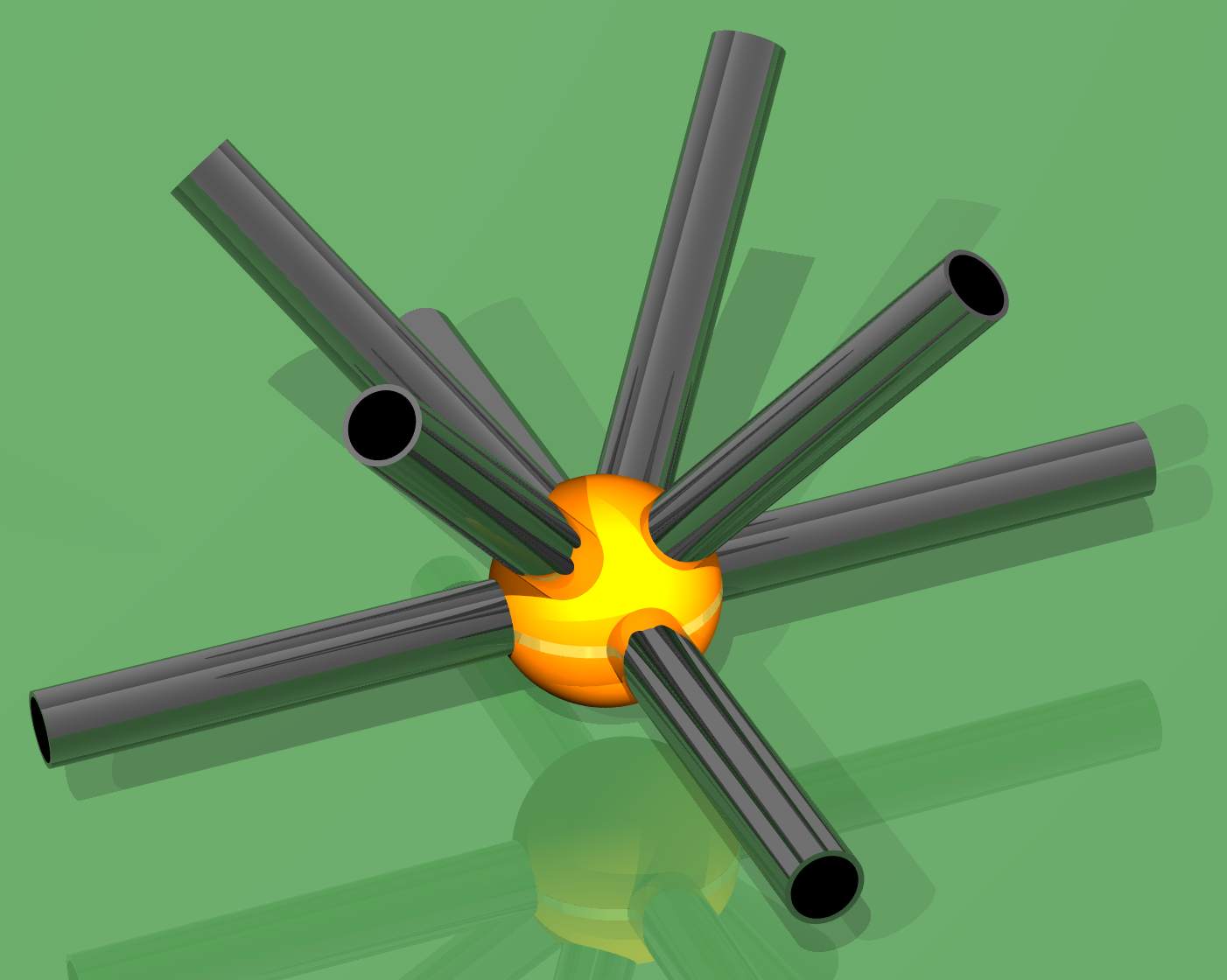 Oktaplatte